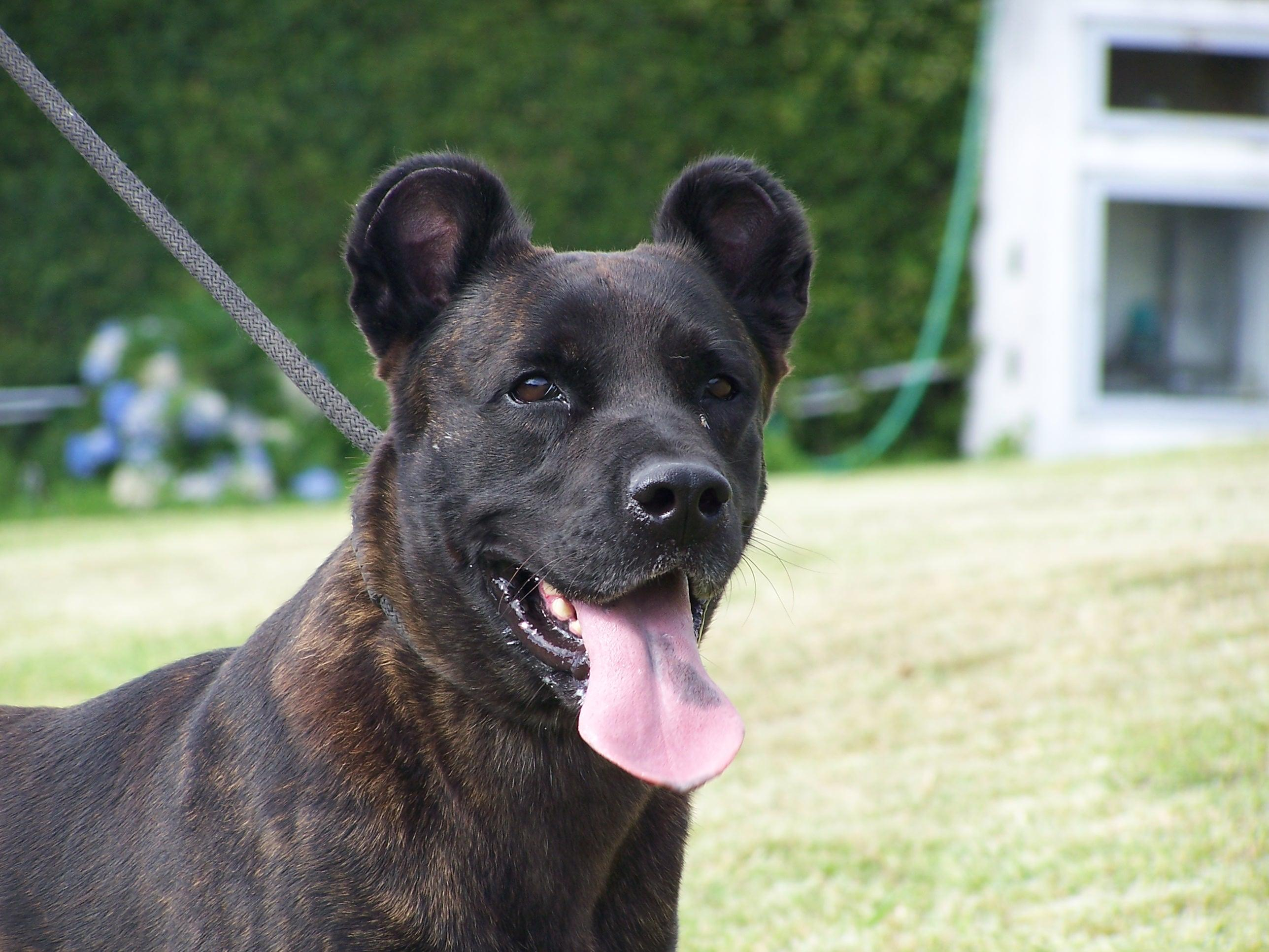 Casa da Praia Kennels- Azores- Portugal